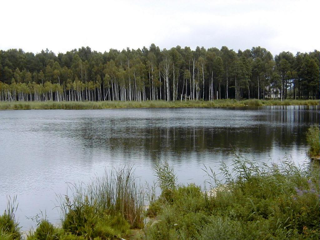 Titurgas ezers Baložos. 2002-07-21